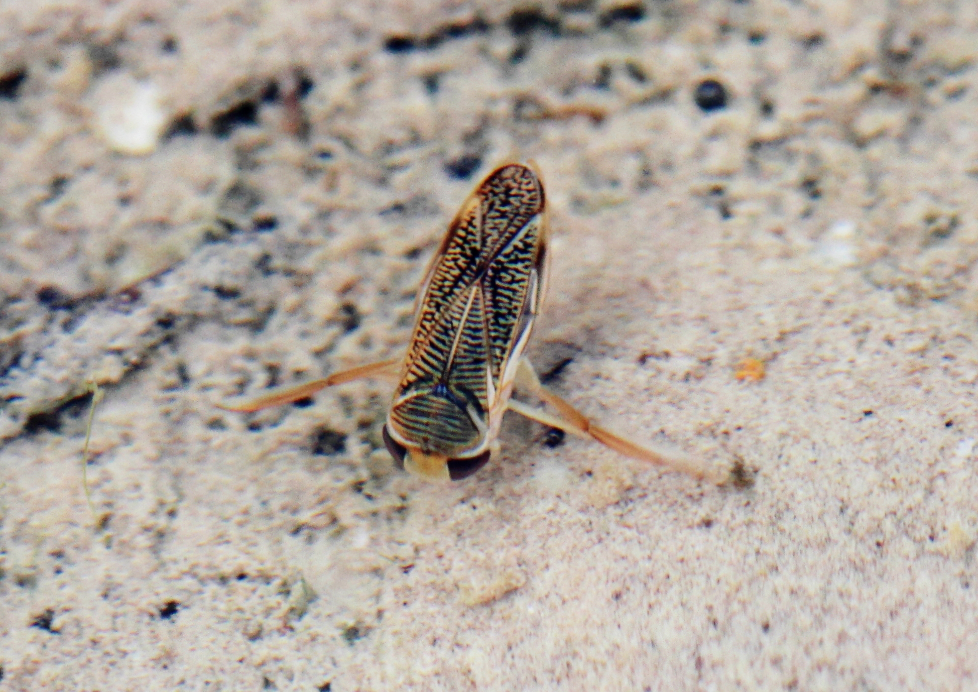 Eine Ruderwanze (Sigara striata) in der Steiermark in der Nähe des Hubertussees.